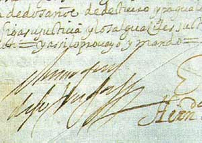 Firma y rúbrica de Juan de Borja y Armendia, séptimo Presidente de la Real Audiencia de Santafé de Bogotá